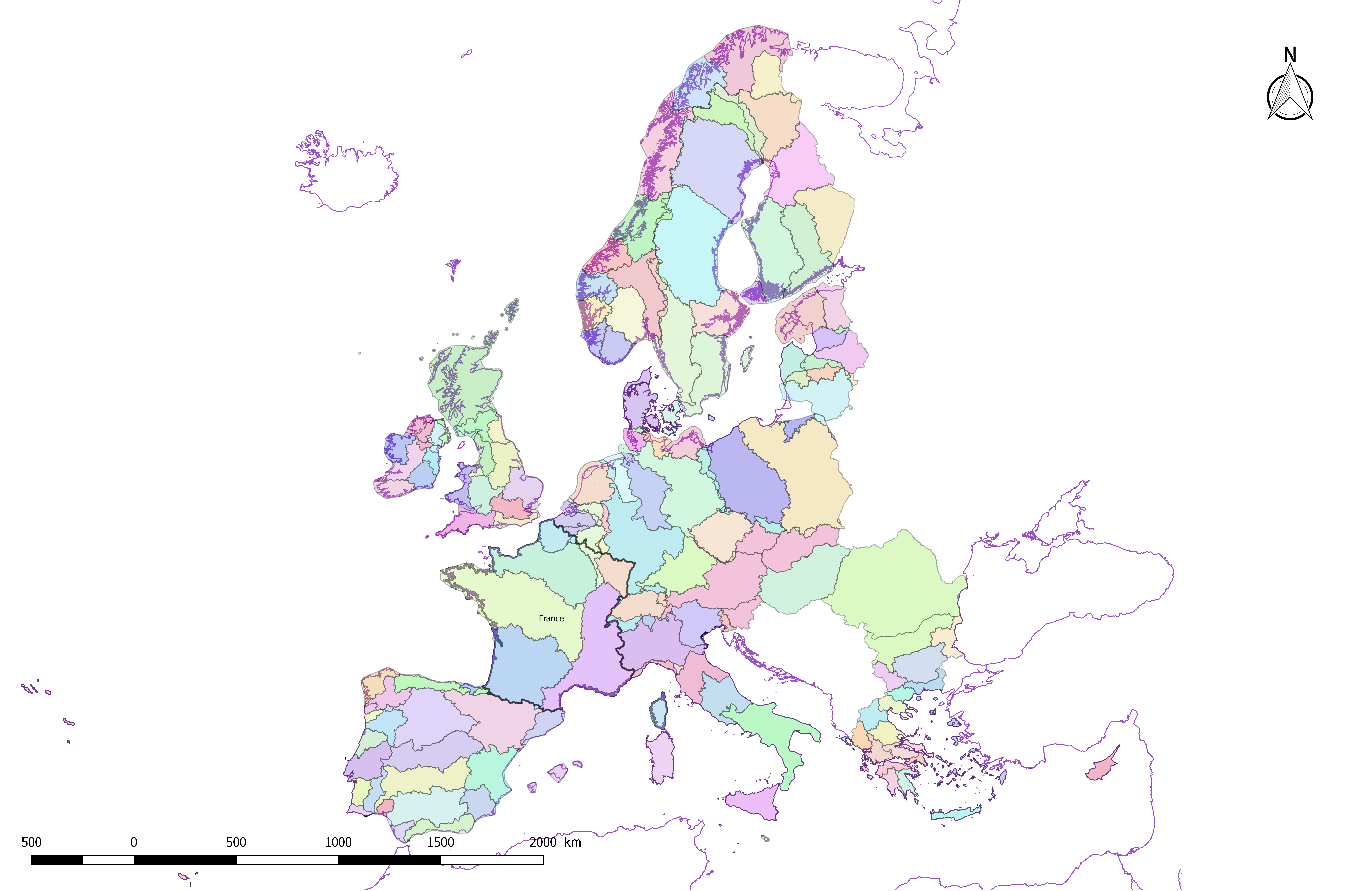 Carte des districts hydrographiques en Europe, au sens de la Directive inondation du 23 octobre 2007.